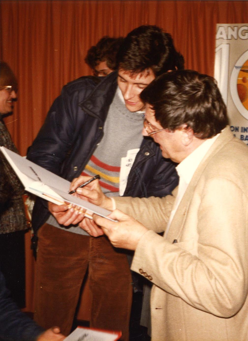 André Franquin lors du festival d'Angoulême en 1983.